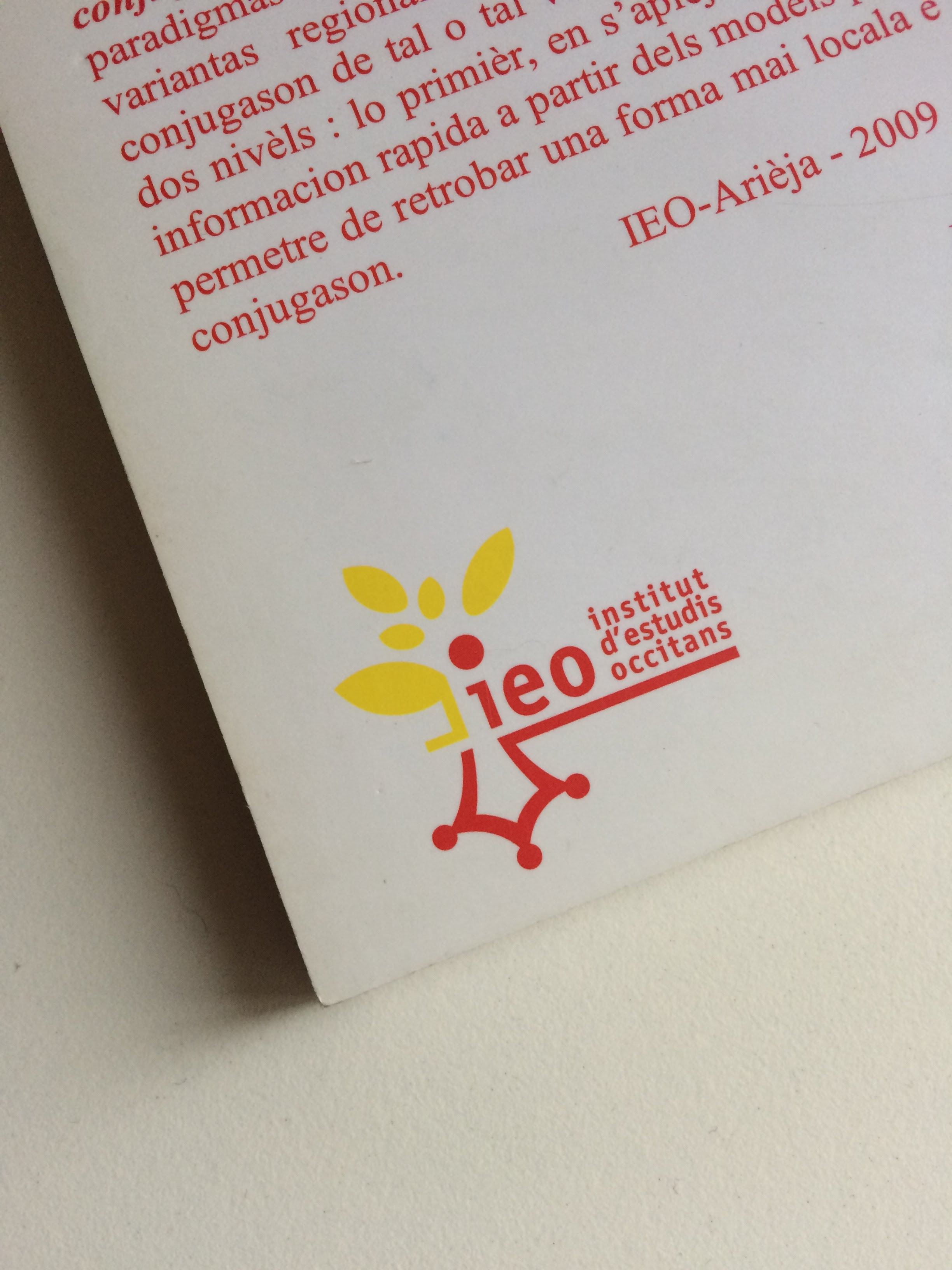 Publicacion amb lo lògo actual de l'IEO.